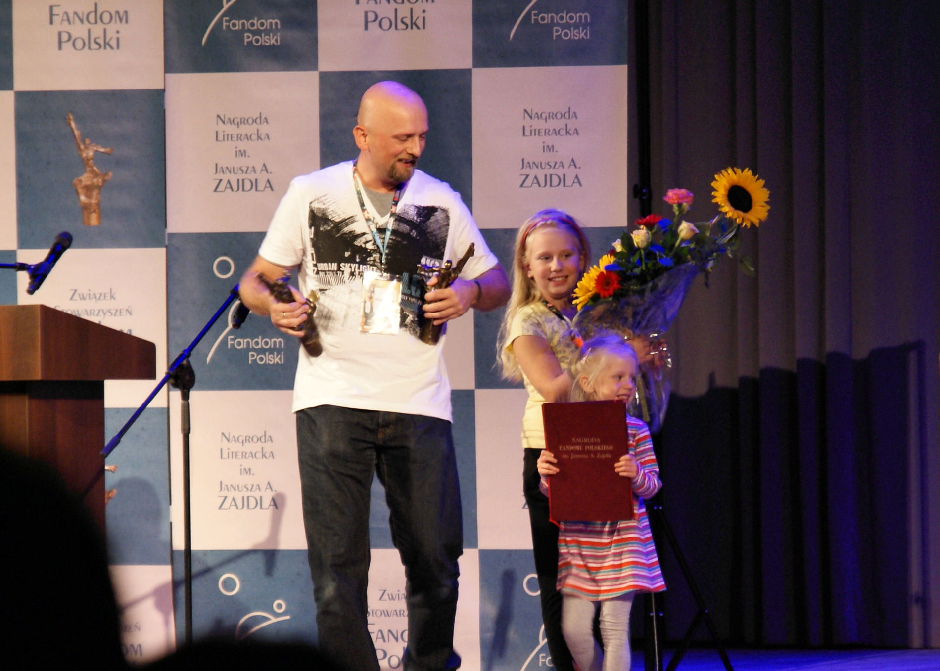 Robert M. Wegner z córkami na gali rozdania nagród im. Janusza A. Zajdla, Polcon 2013, Warszawa